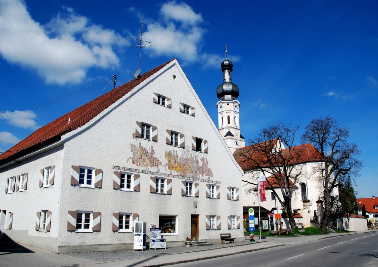 Inning am Ammersee, Marktplatz 10. Ehemaliger Salzstadel. Breit gelagerter, zweigeschossiger Satteldachbau, erbaut 1646.